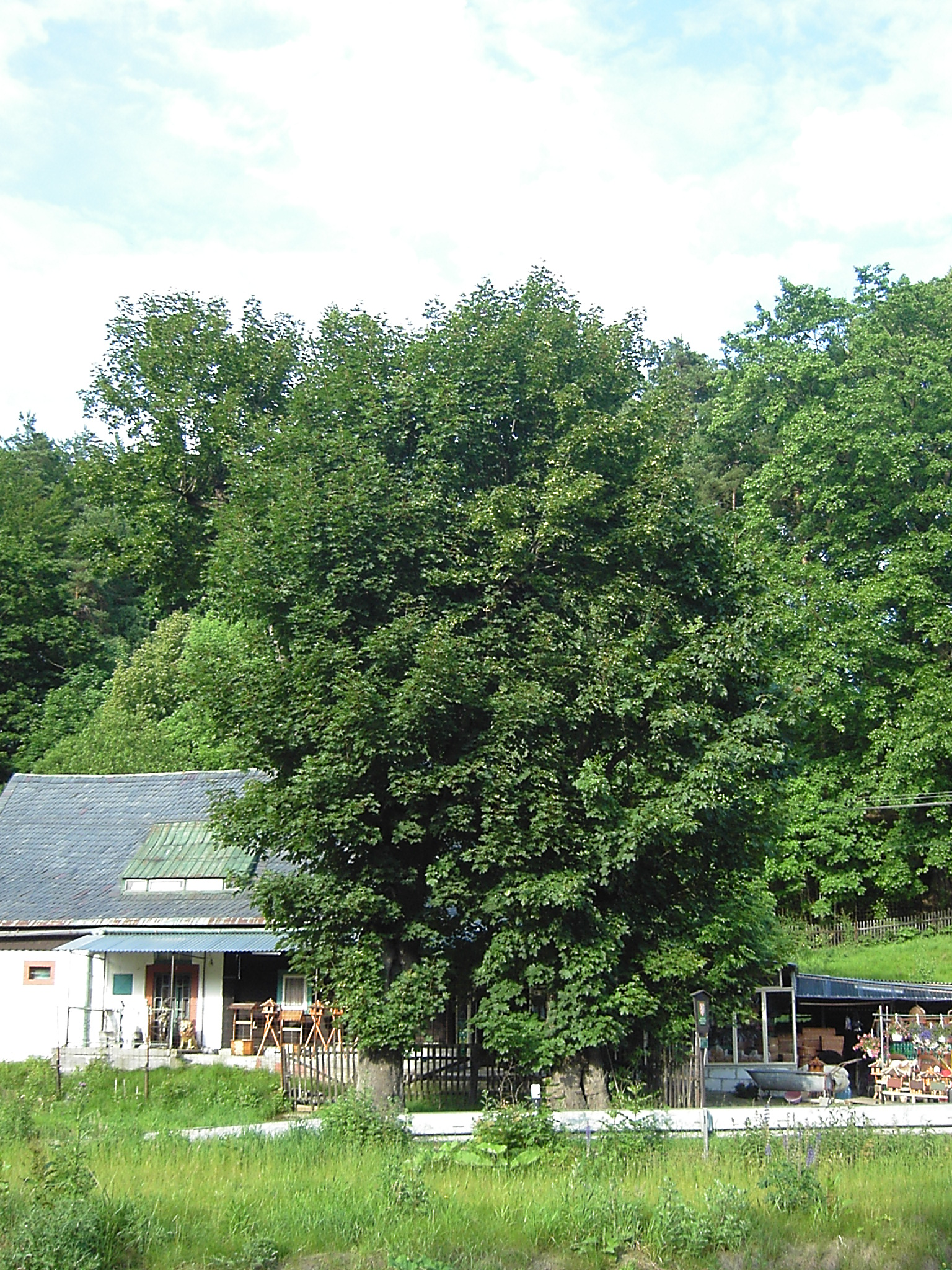 Javorová brána v Rožanech